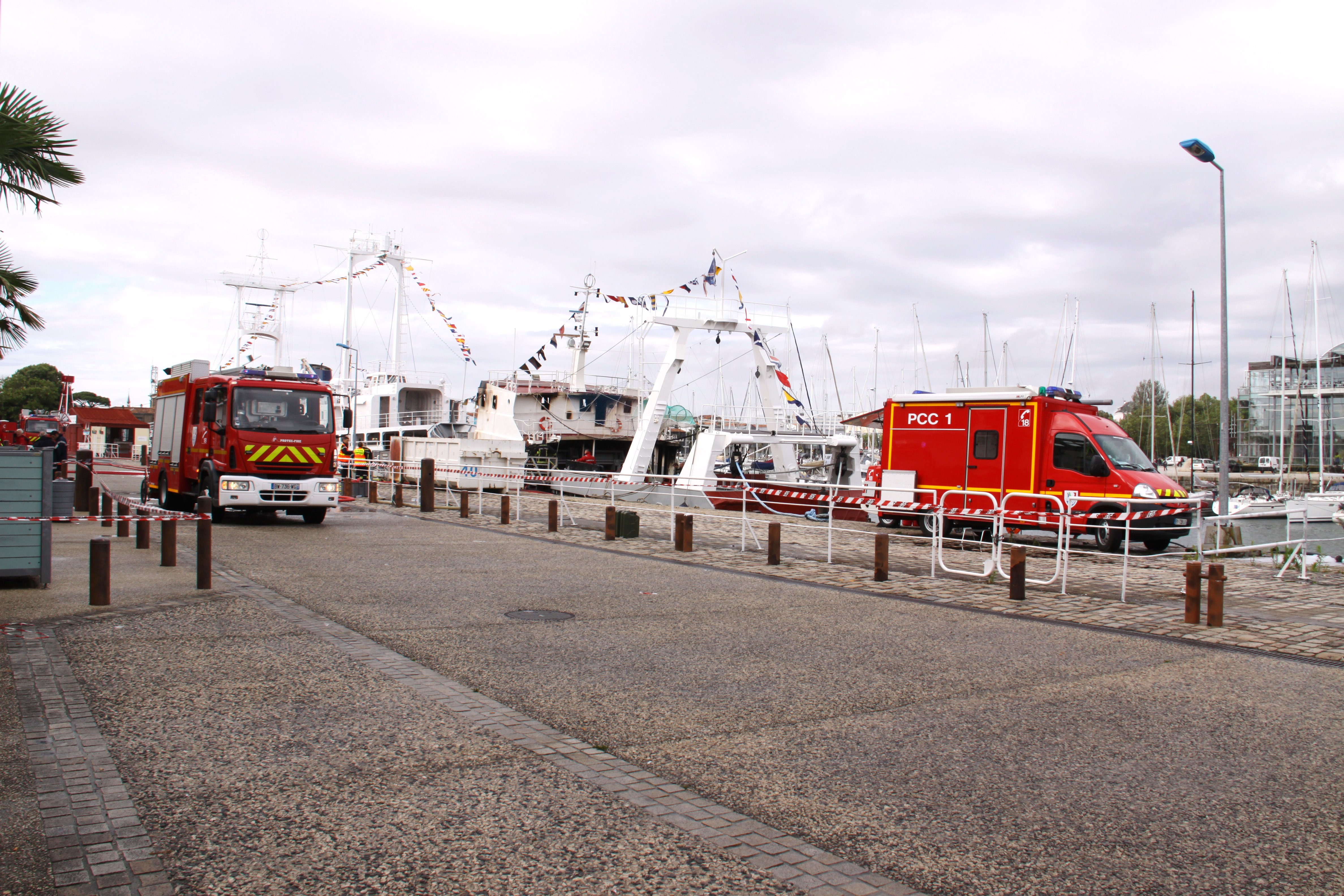 Incendie, le jeudi 12 juillet 2012, du chalutier semi-industriel "Angoumois" LR 316353 classé Monument Historique en 1993 (Flotte Patrimoniale du Musée Maritime de La Rochelle): véhicules de pompiers sur le Quai R. Sénac de Meilhan lors de la continuation de l' intervention des pompiers le jour suivant de l' incendie pour éteindre la reprise du feu et vider l' eau de la cale du bateau de pêche. La Rochelle, Charente Maritime, France.